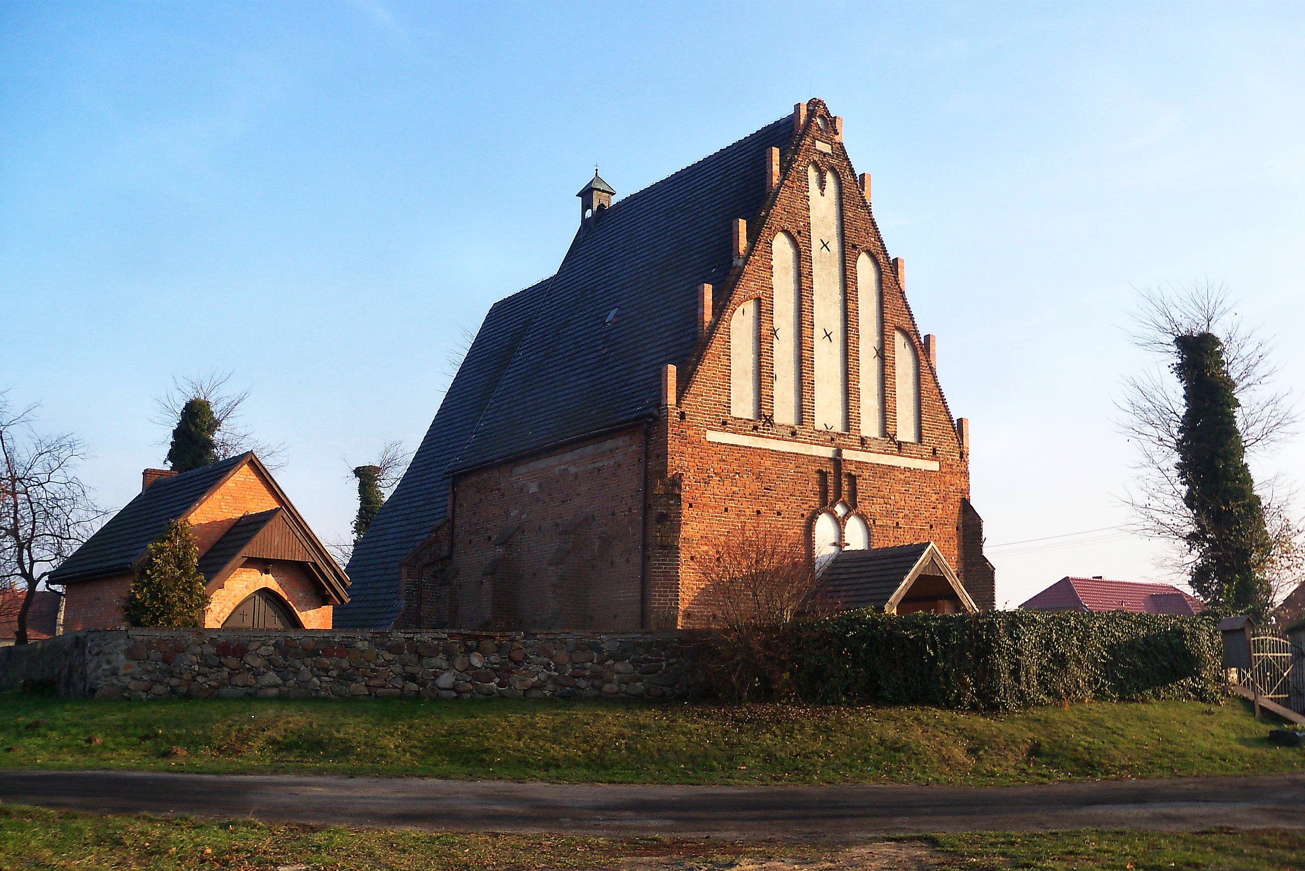 Dębowa Łęka, zespół kościoła par. p.w. św. Jadwigi